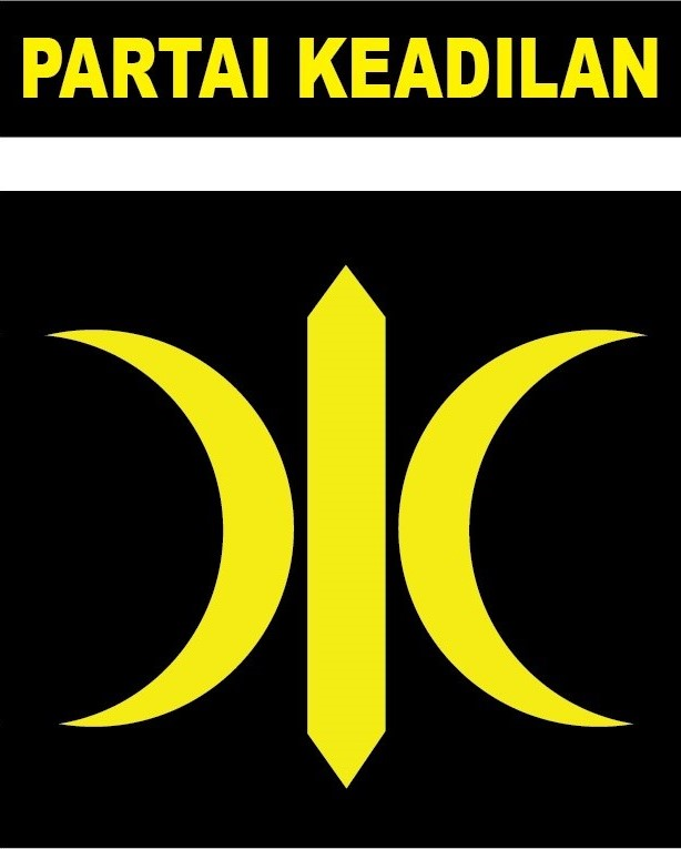 Logo Partai Keadilan